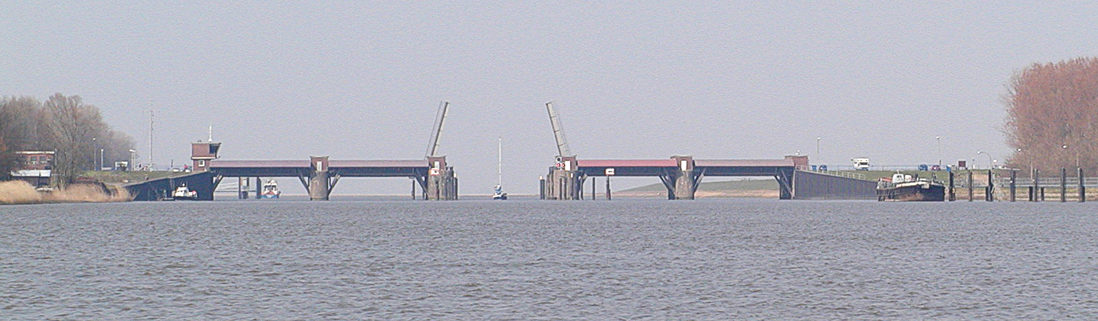 Die Brücke ist oben, ein kleine Segelboot kommt in die Oste